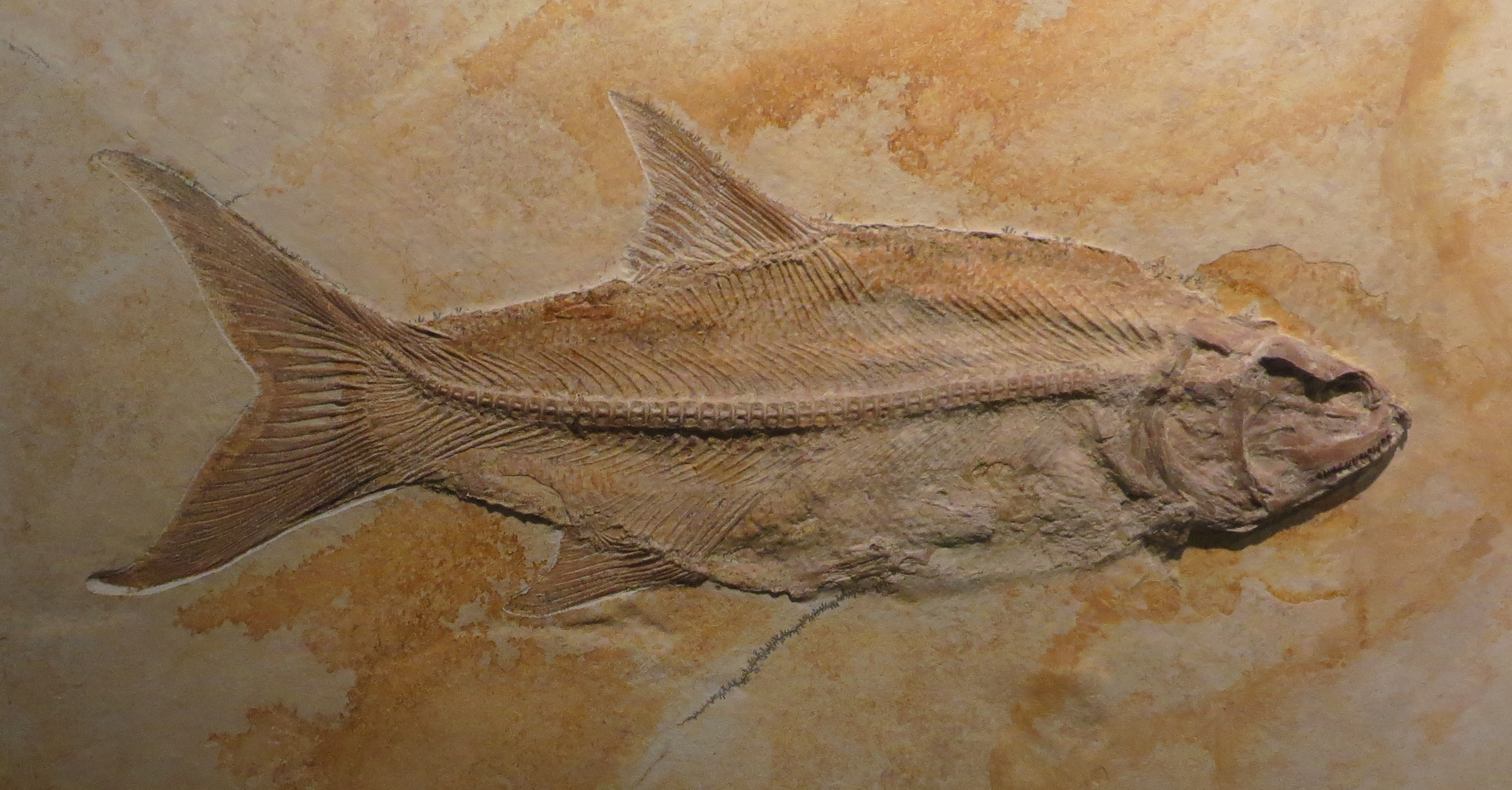 Took the picture at Burgmeister Muller Museum, Solnhofen